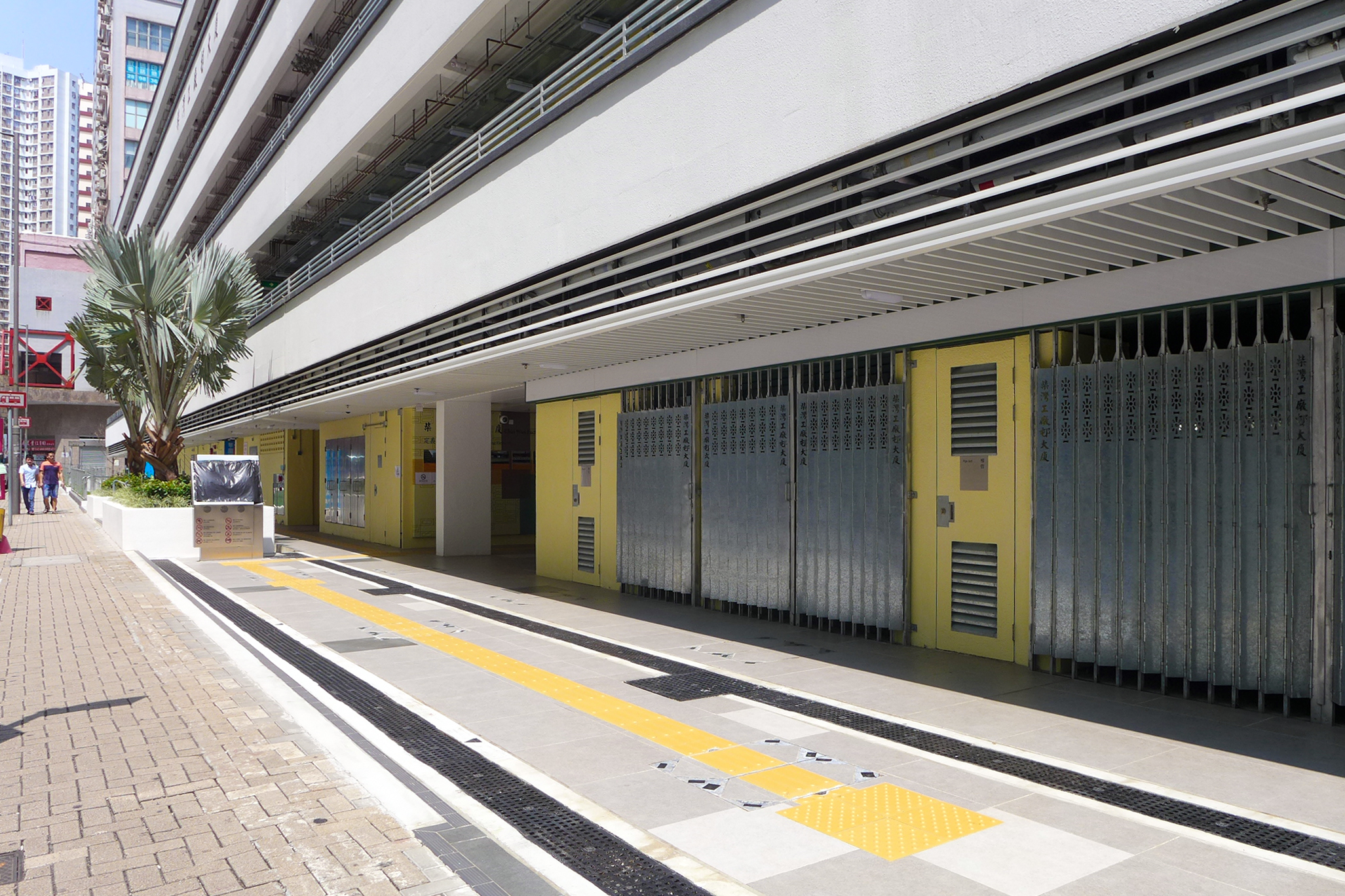 Wah Ha Estate GF Shops